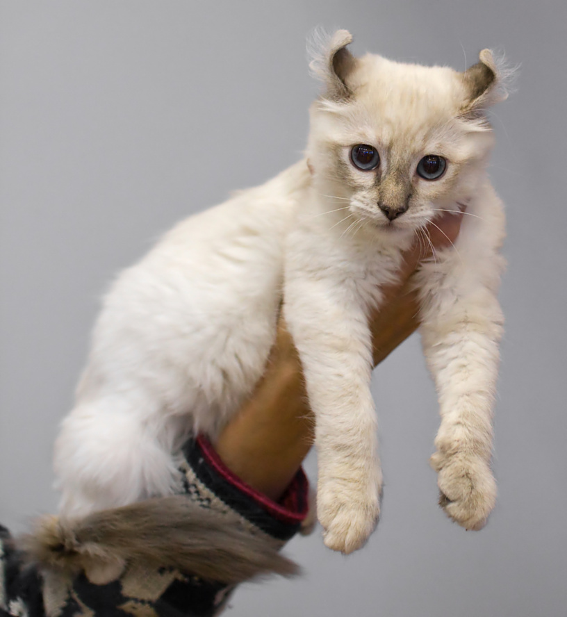 Magnificat Gimlet Curl, chaton american curl présenté en exposition féline à Riihimäki en 2008. Code EMS : ACL g 21 33